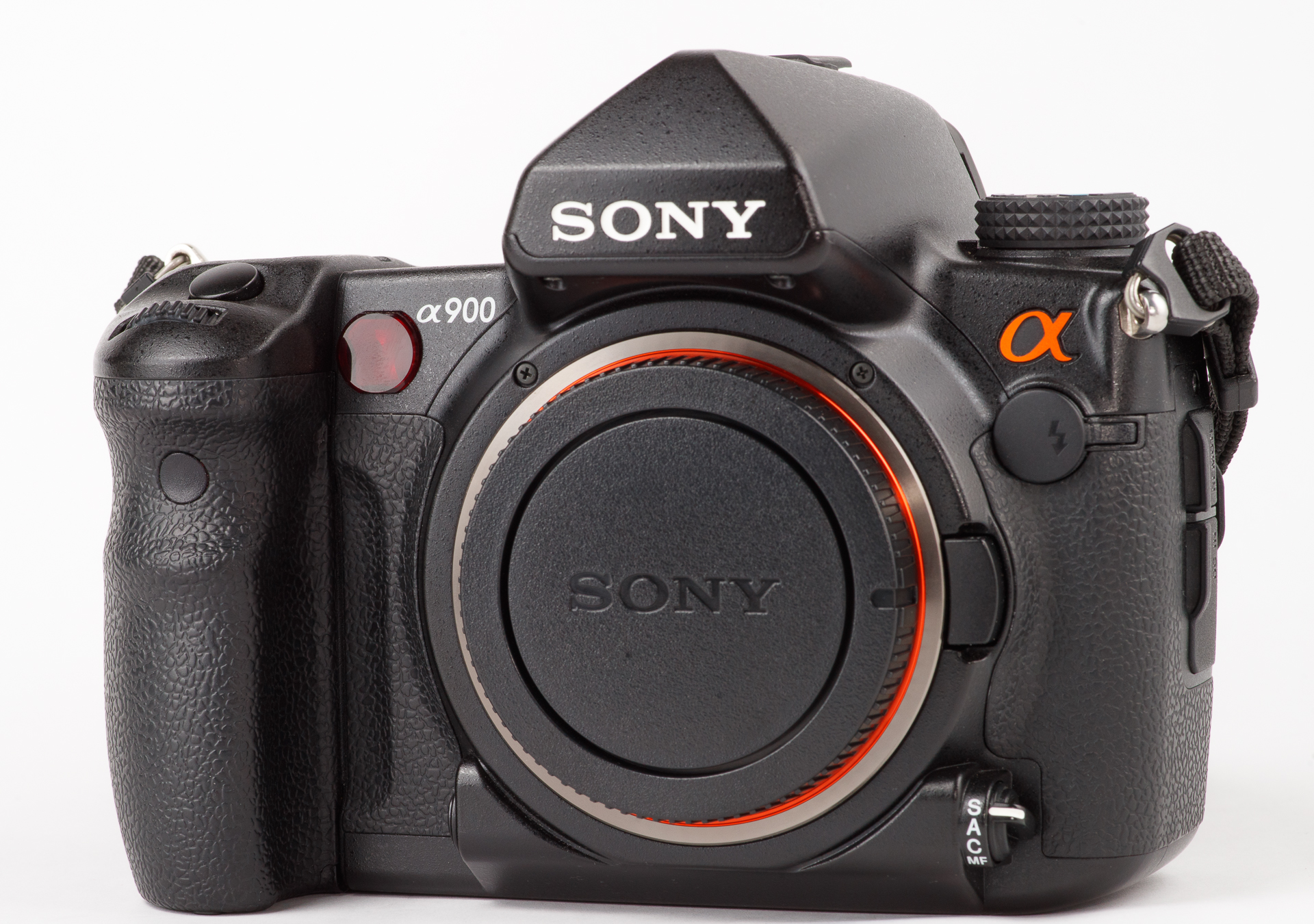 初代 SONY Aマウント 35mmフルサイズ フラッグシップ機